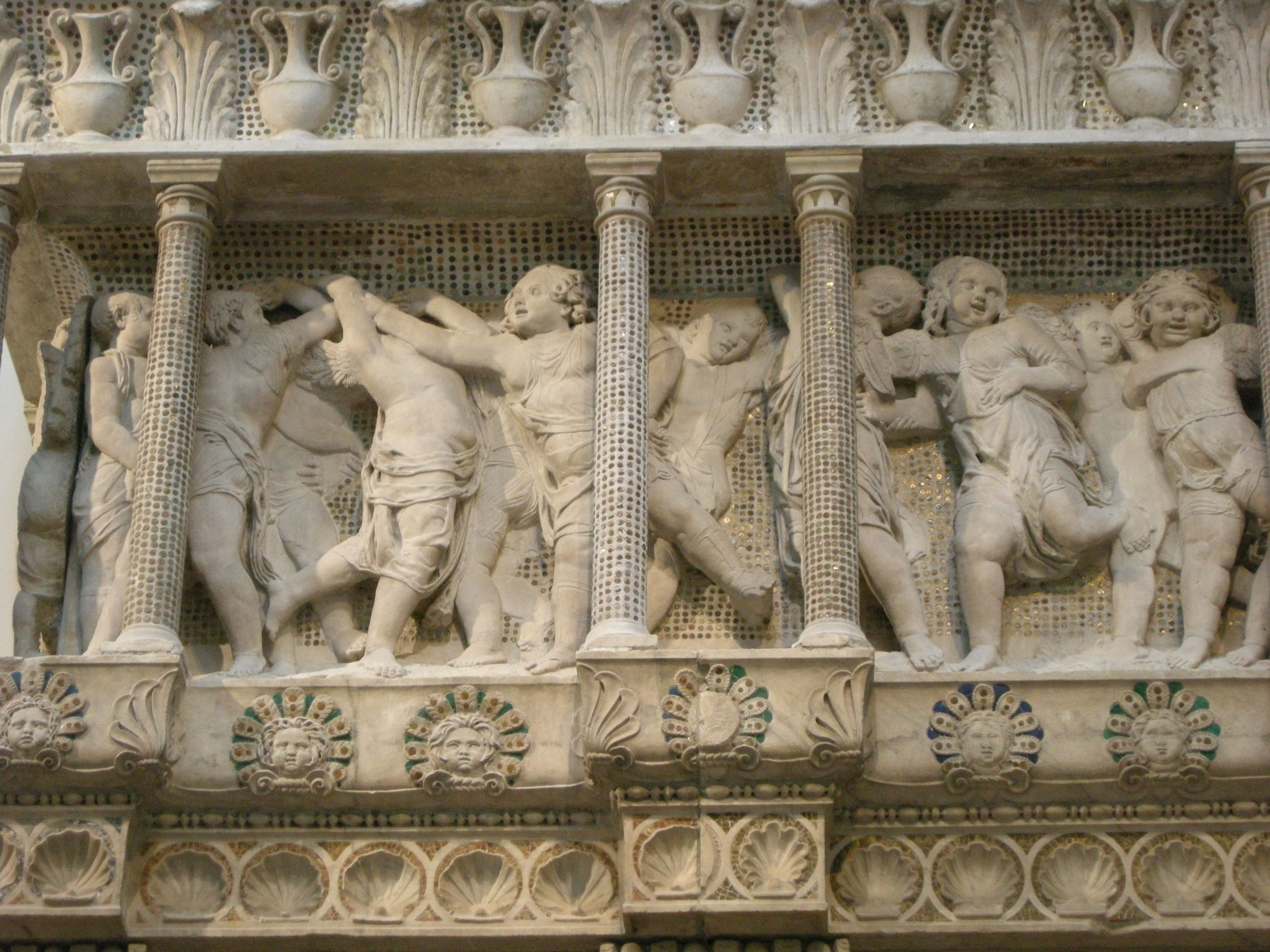 Cantoria di donatello